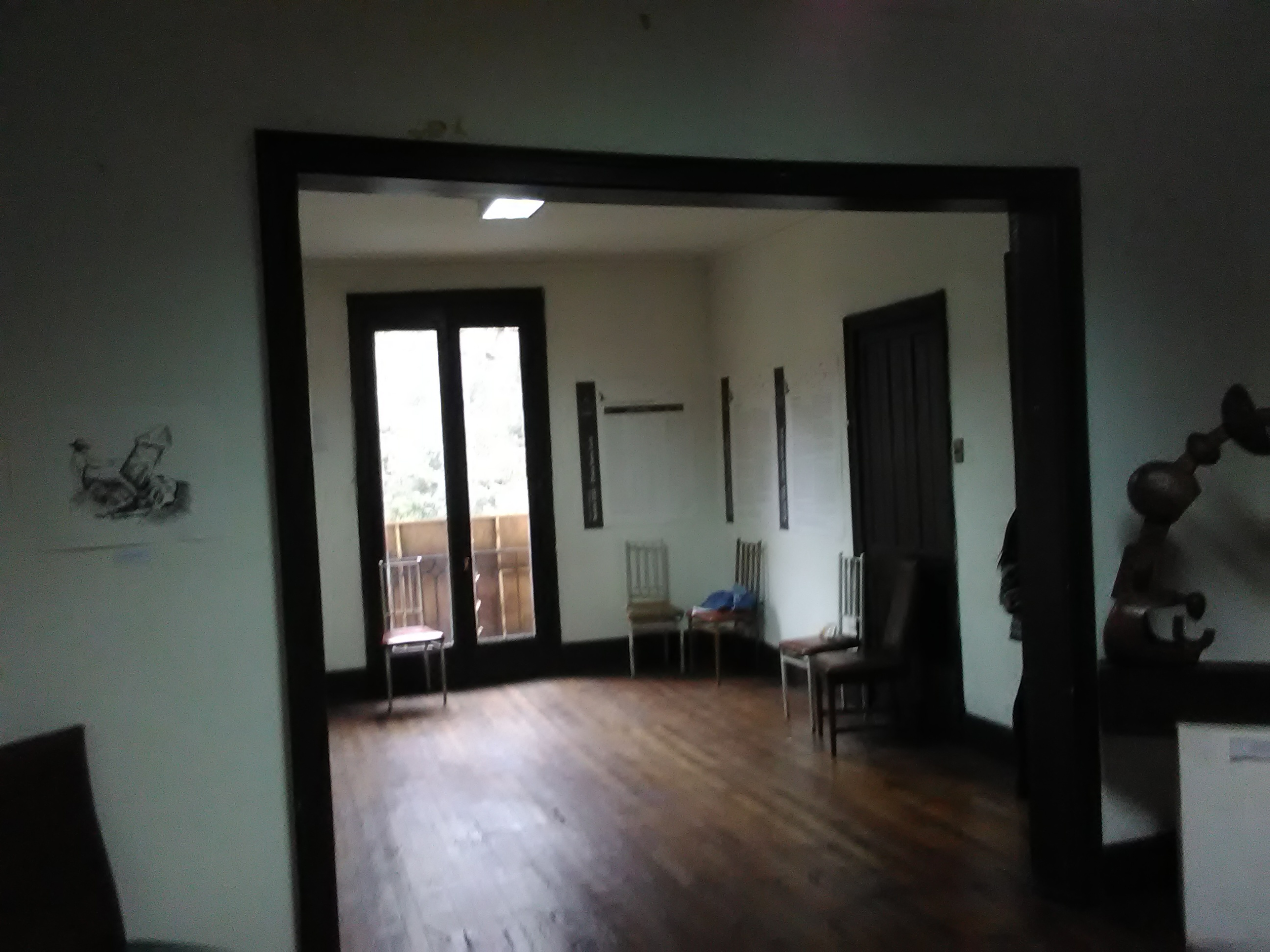 Ubicado en Santiago de Chile, frente al cerro del mismo nombre, fue usado como lugar de torturas y de desaparición de personas durante los primeros años del Régimen Militar.